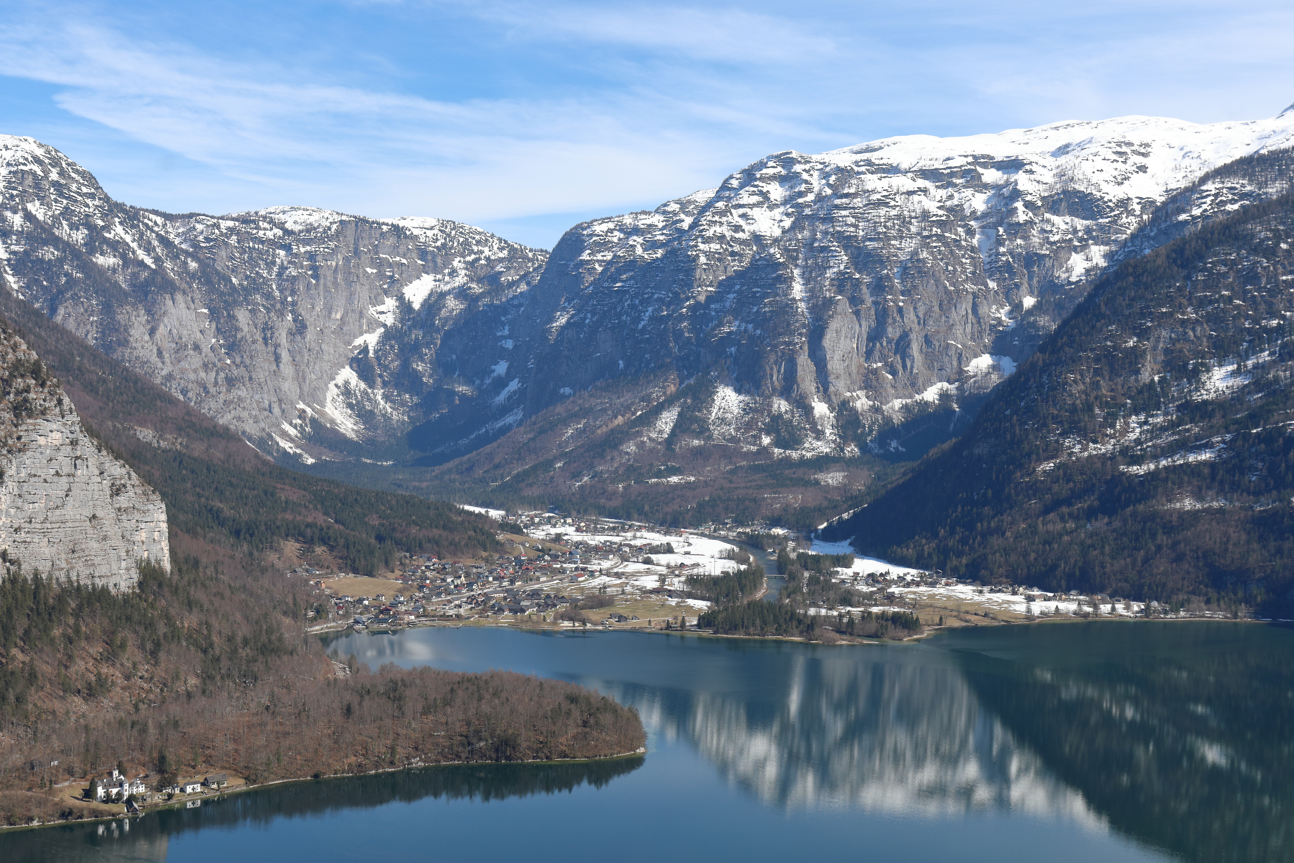 Blick von der 2013 errichteten Aussichtsplattform „Welterbeblick“ auf die oberösterreichische Gemeinde Obertraun am südöstlichen Ufer des Hallstätter Sees und links unten das Schloss Grub.